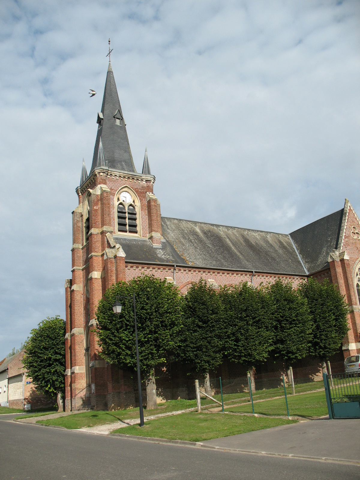 église de Fréchencourt vue du sud-est. Construction en briques de style néo-gothique.